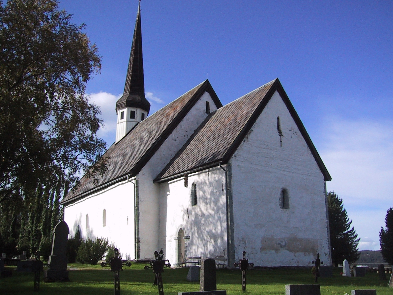 Skaun kyrkje